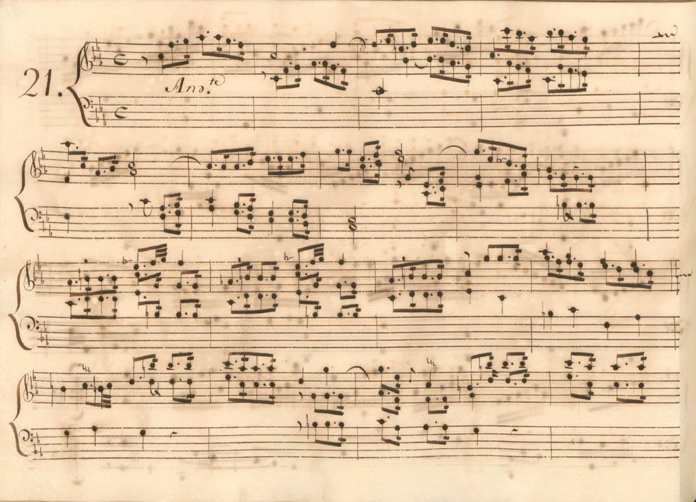 La sonate K. 238, telle qu'elle se présente dans le manuscrit de Parme, volume V no. 21.